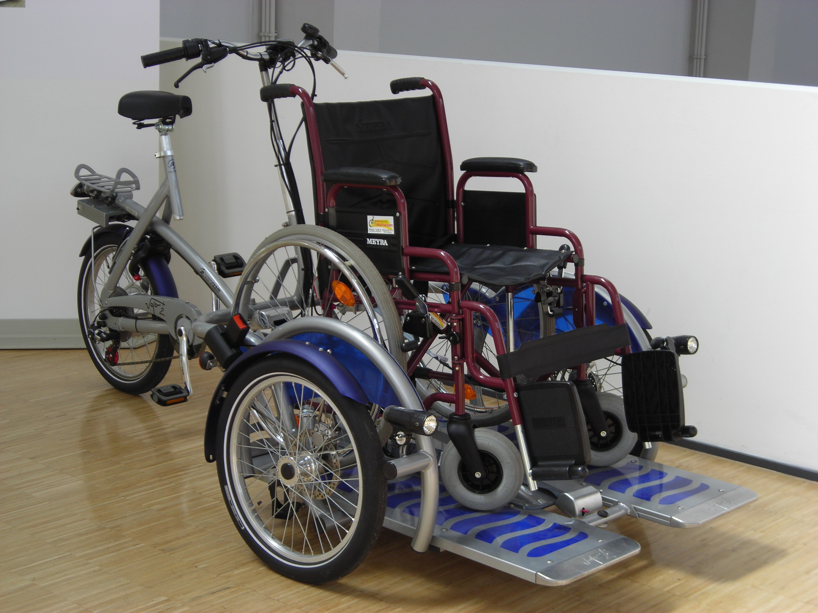 Fahrrad mit Rollstuhlplattform — Exponat im Deutschen Museum Verkehrszentrum, Hersteller: Van Raam BV, CM Varsseveld, Niederlande; Modell: Velo-Plus 2 Produktinformation